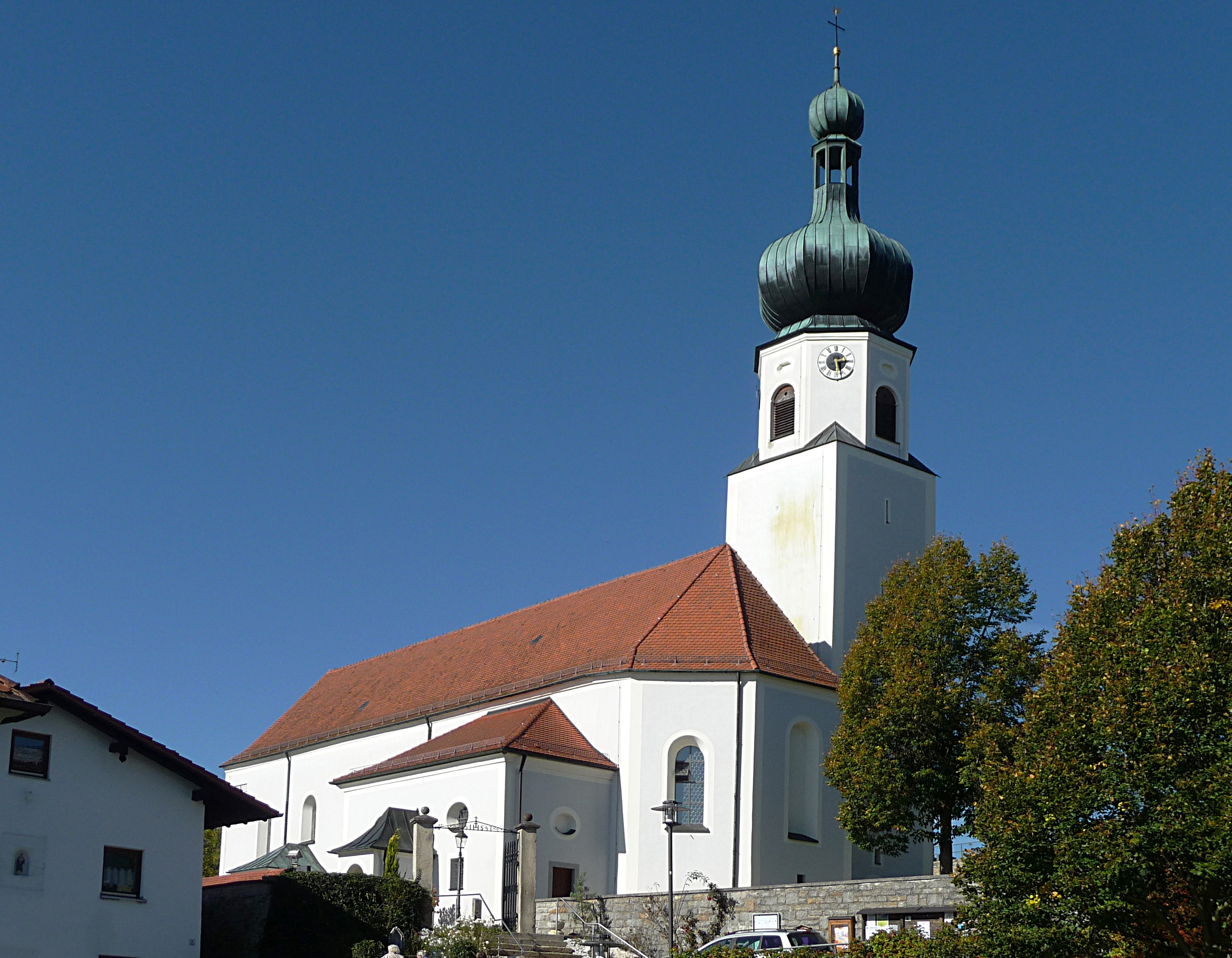 Die Pfarrkirche St. Johannes in Moosbach